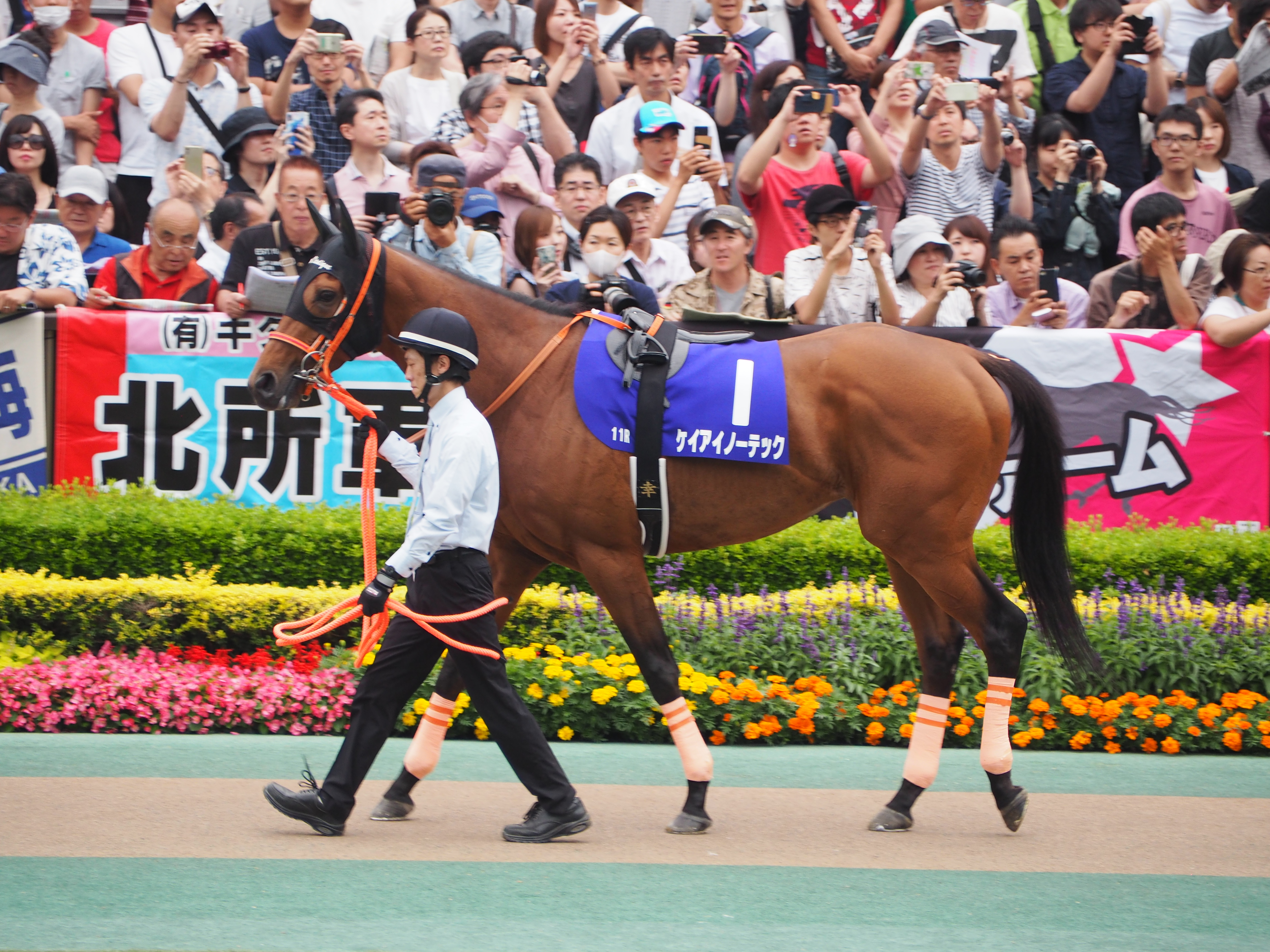 安田記念 パドック 2019